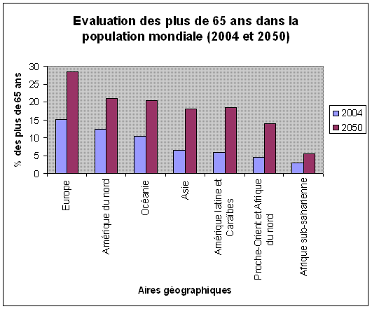 Evaluation des plus de 65 ans dans la population totale (Source : US Bureau of census).